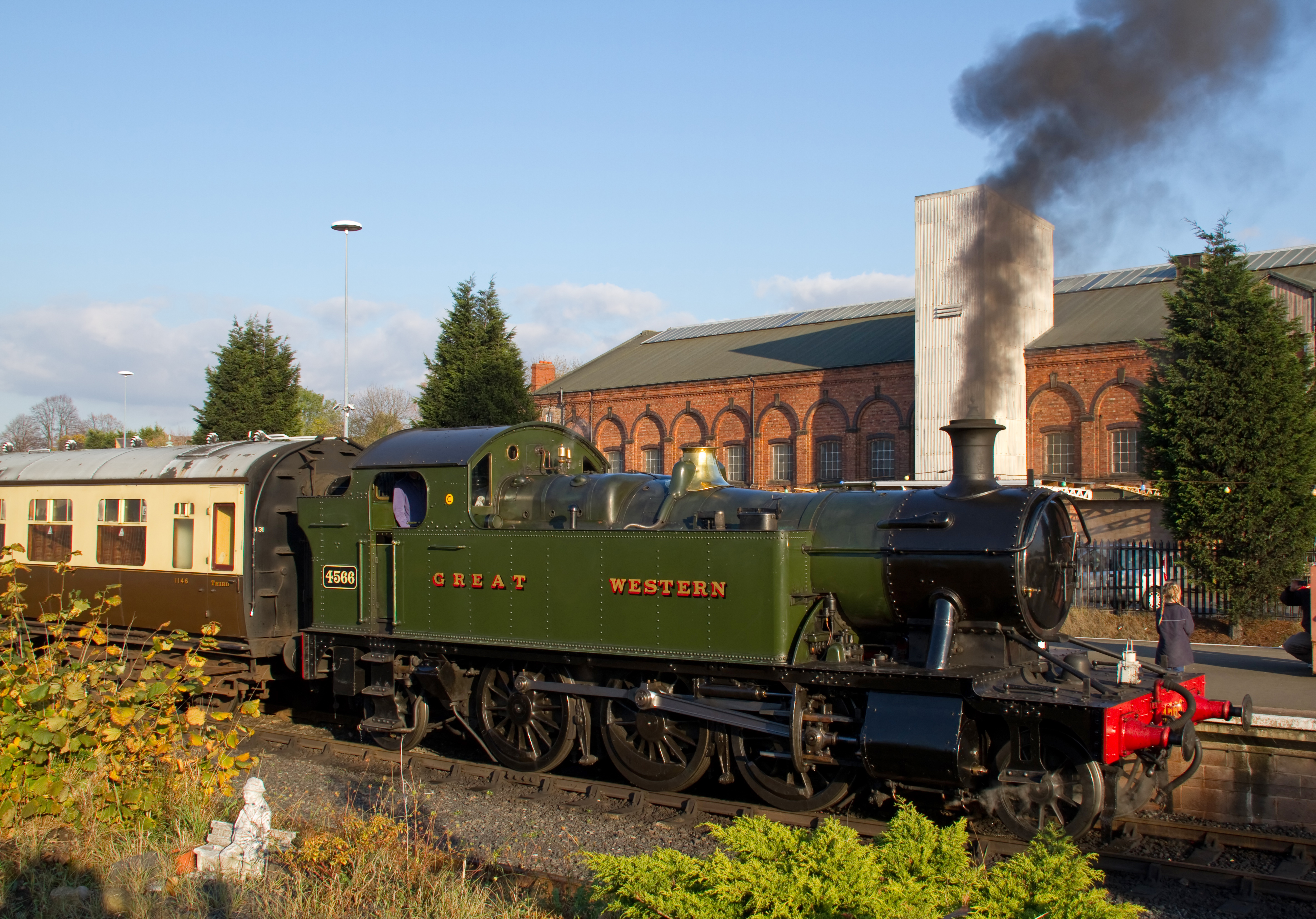 4566 waiting at Kidderminster